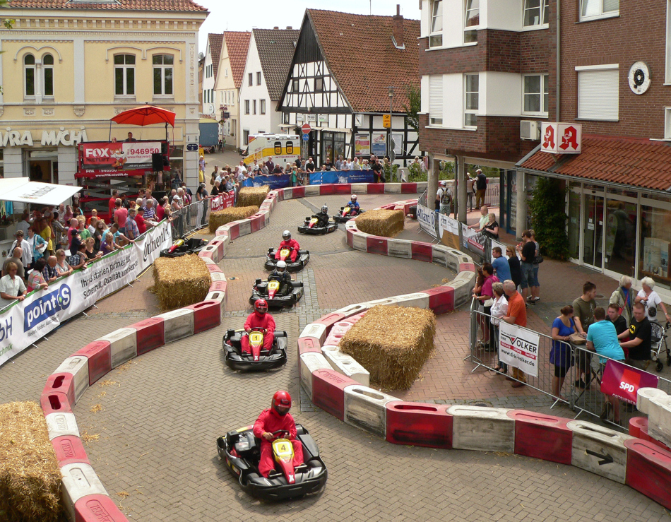 Gehrden